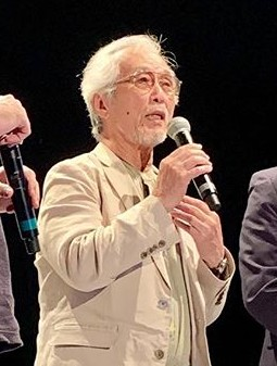 Yoichi Kotabe au festival international du film d'animation d'Annecy 2019.